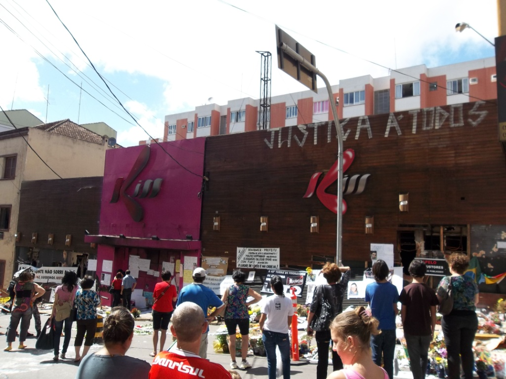 Boate que sofreu incêndio no município de Santa Maria - RS.